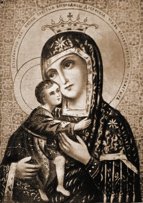 Дубенская Красногорская икона Божией Матери. Литография начала XX века с изображением первообраза.